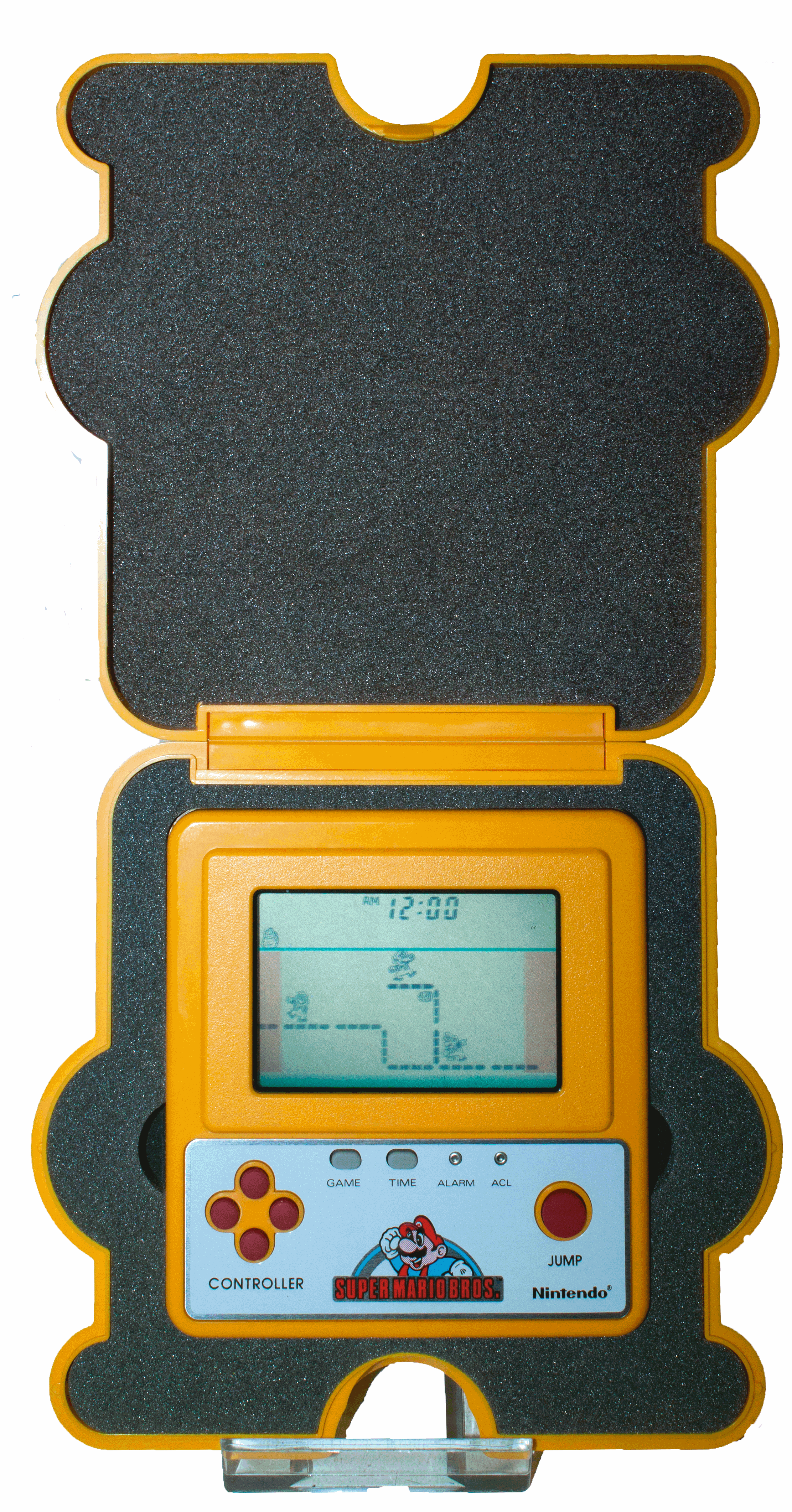 Eine seltene Version eines Game and Watch von Nintendo mit Super Mario Bros.